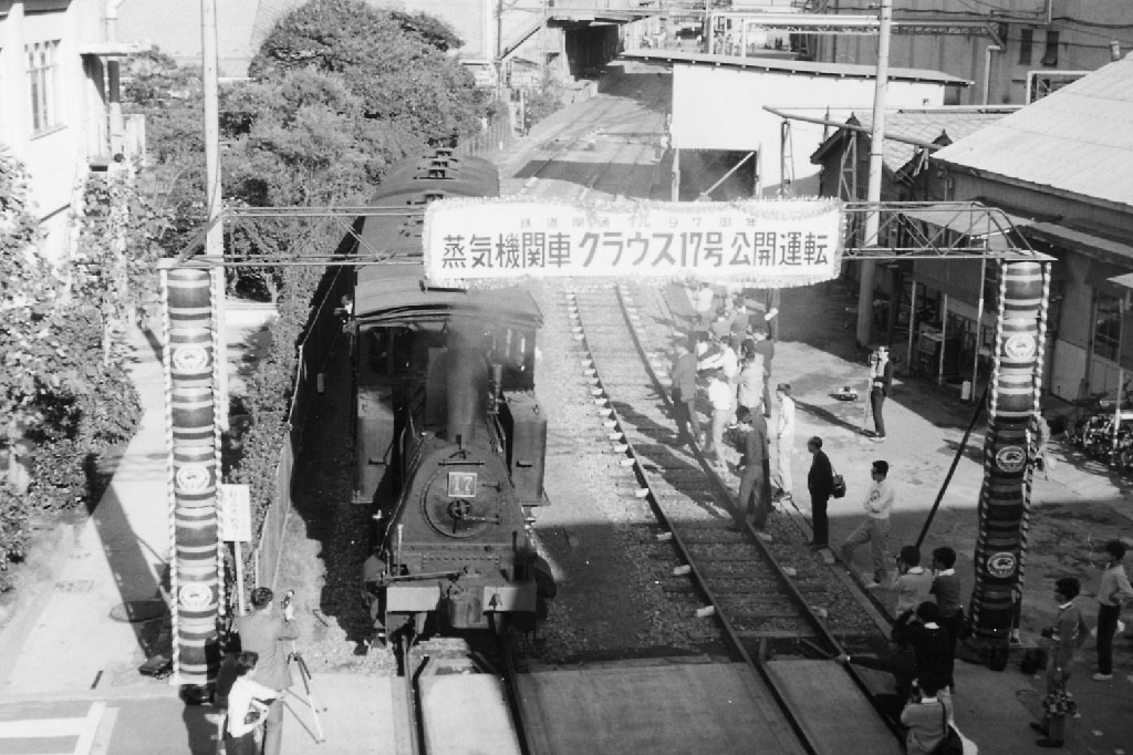 国鉄10形蒸気機関車17号機（キリンビール専用線（鶴見駅近く））